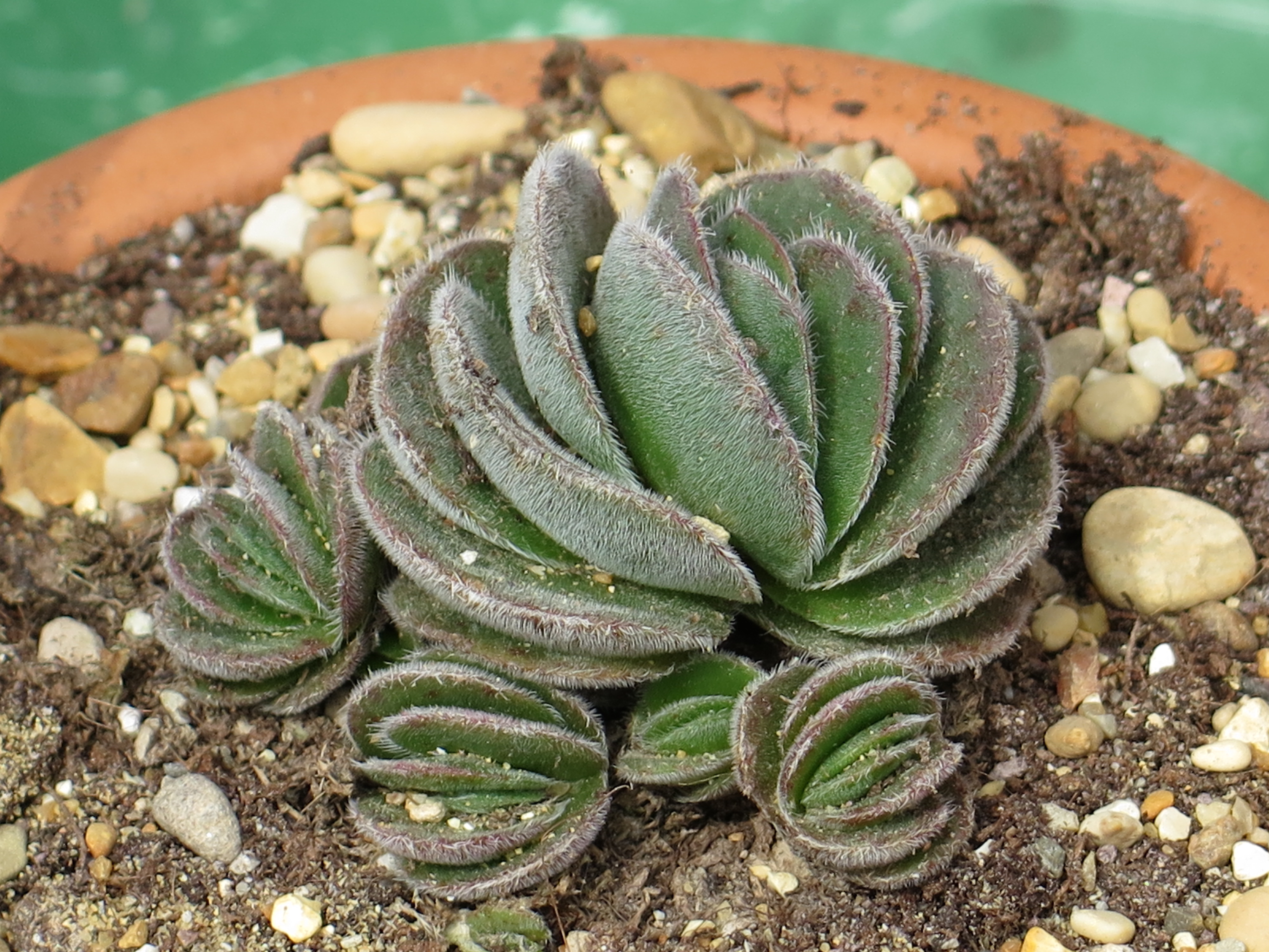 Una pianta di crassula tomentosa, specie di Crassula